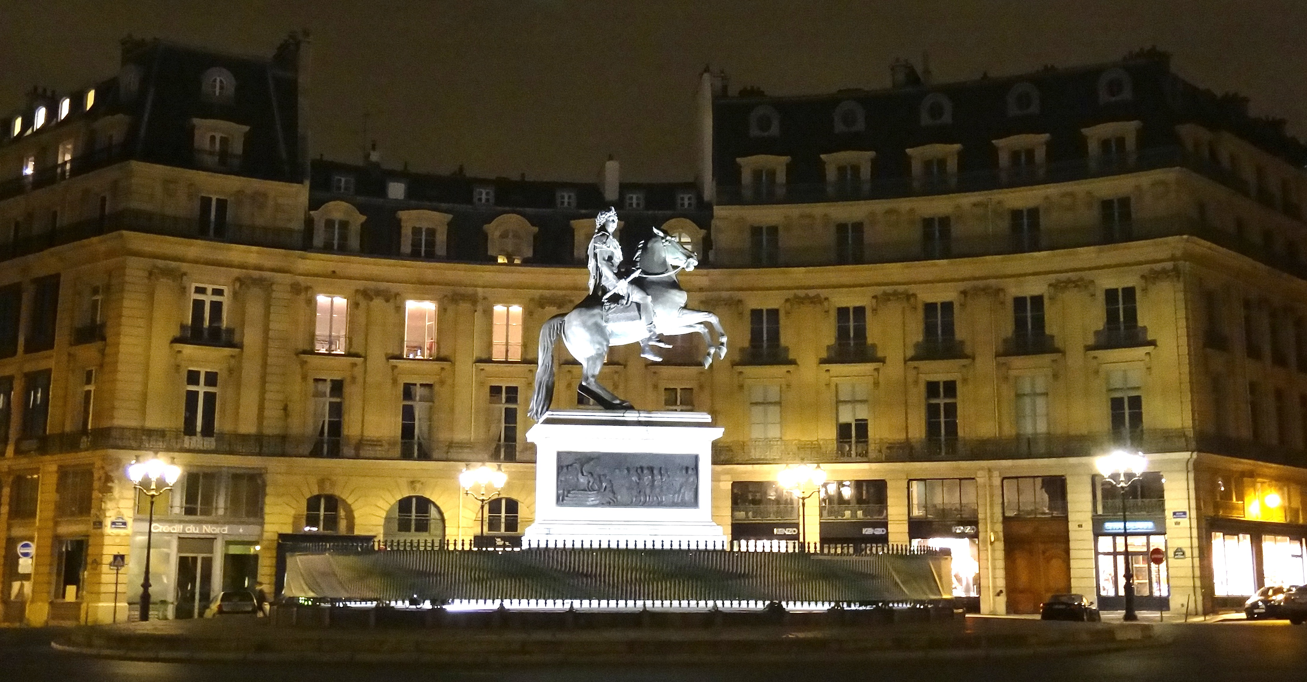 Place des Victoires, statue équestre de Louis XIV .